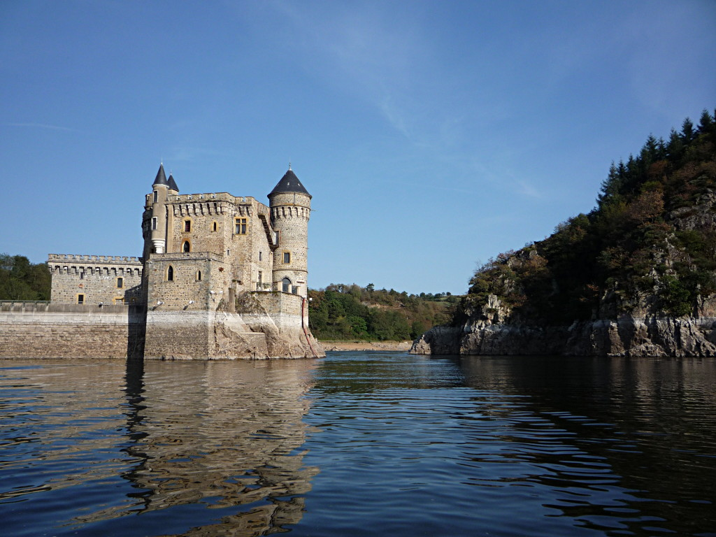 Côté Nord du Château de la Roche, vu de la berge de la Loire.